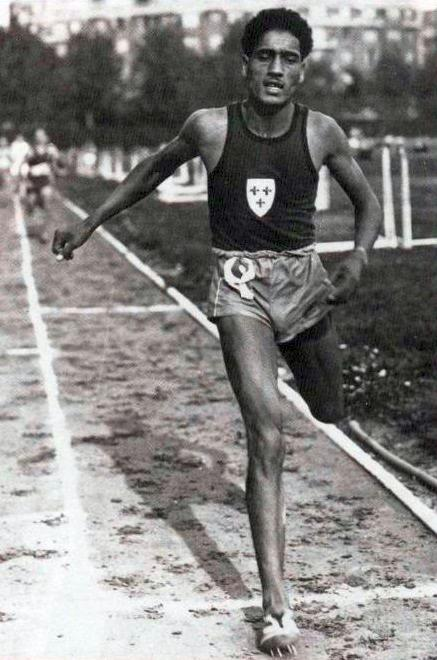 Patrick El Mabrouk durant la deuxième moitié des années 1940.